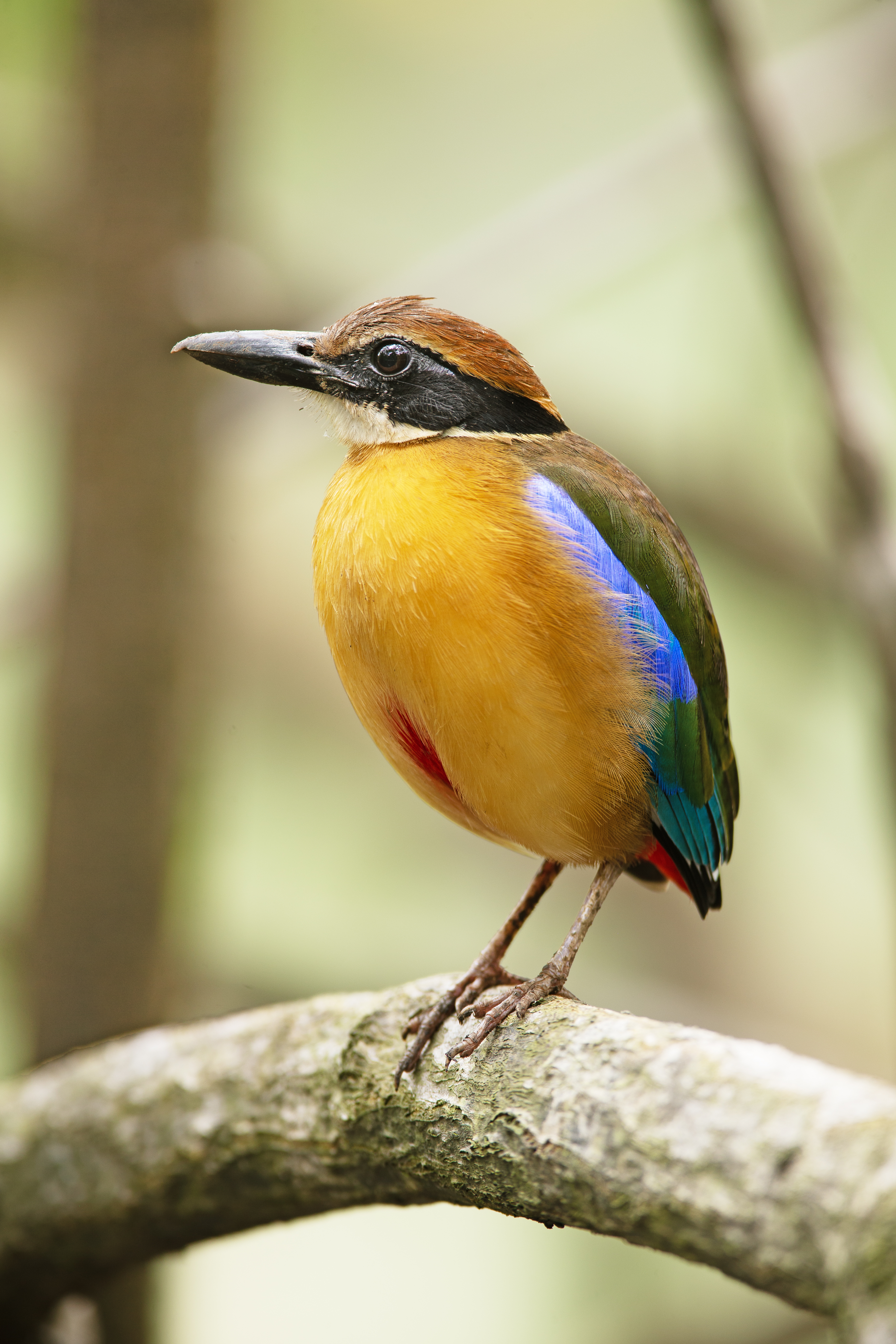 Mangrove Pitta (Pitta megarhyncha), Pulau Ubin, Singapore